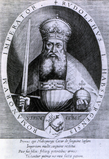 Hegedű alsó része - Violin